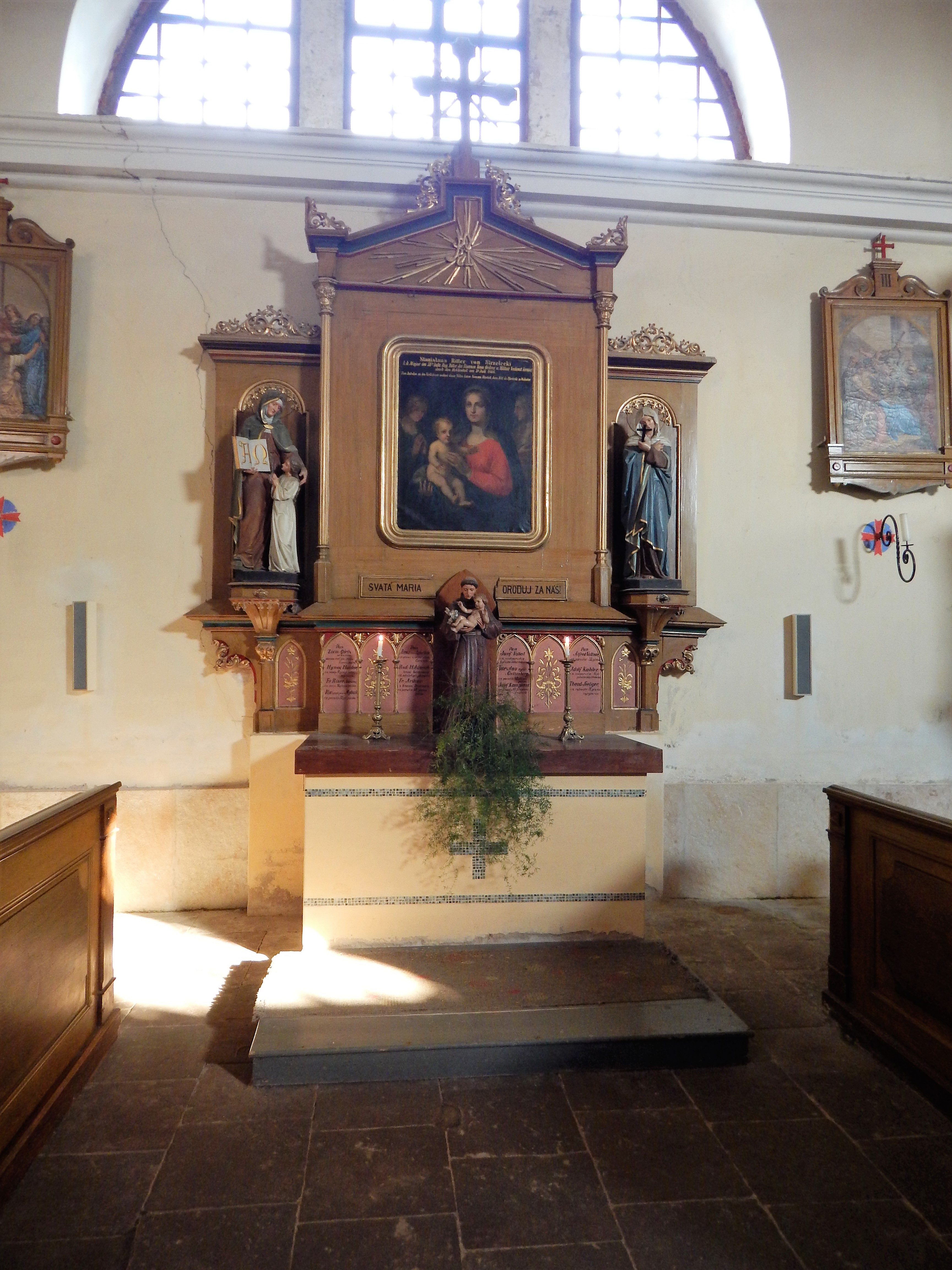 Pomník z prusko-rakouské války r. 1866.